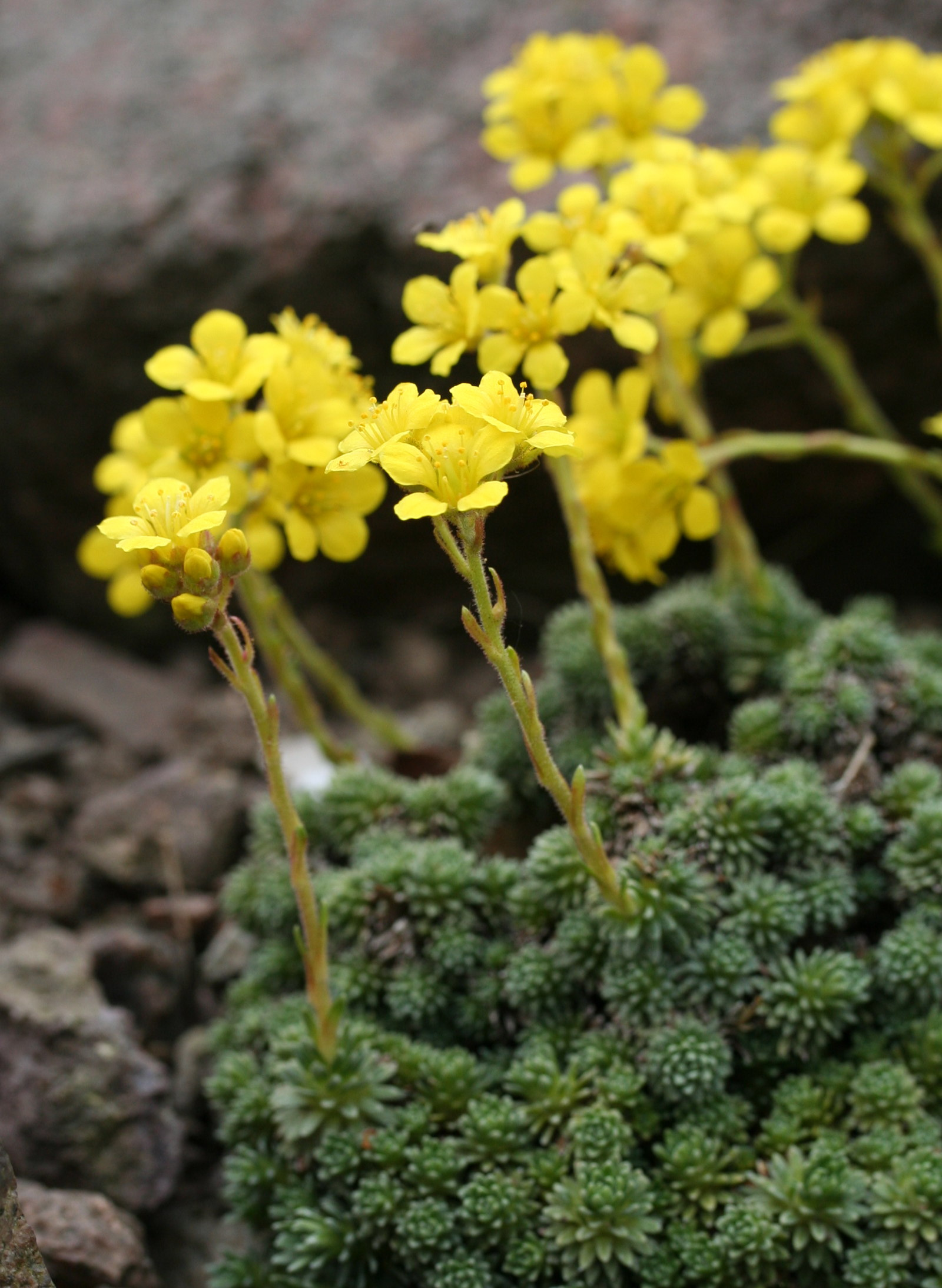 Saxifraga ferdinandi-coburgi im Botanischen Garten Dresden